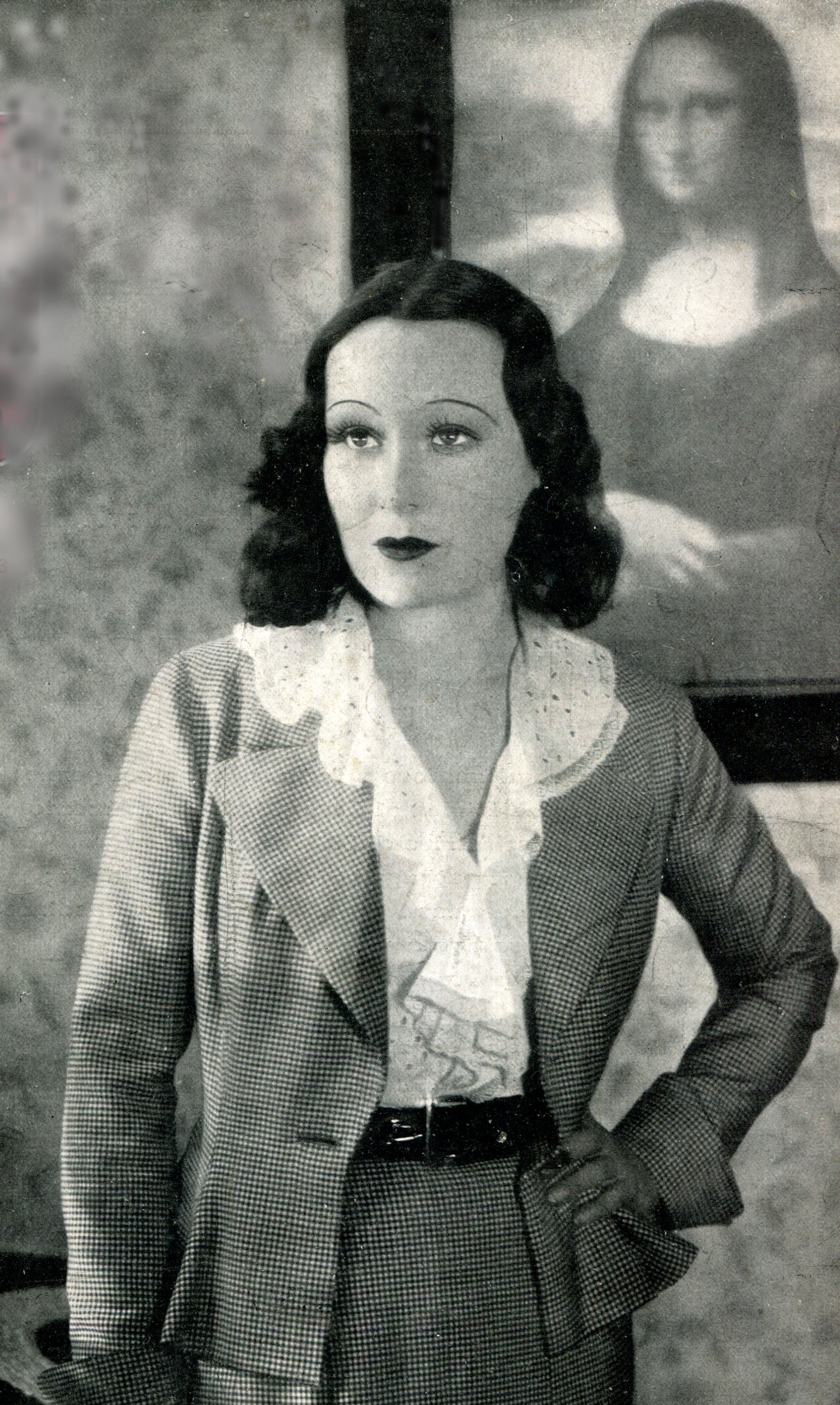 L'attrice Trude von Molo ne Il ratto di Monna Lisa (der Raub der Monna Lisa, von Bolvary, 1931)